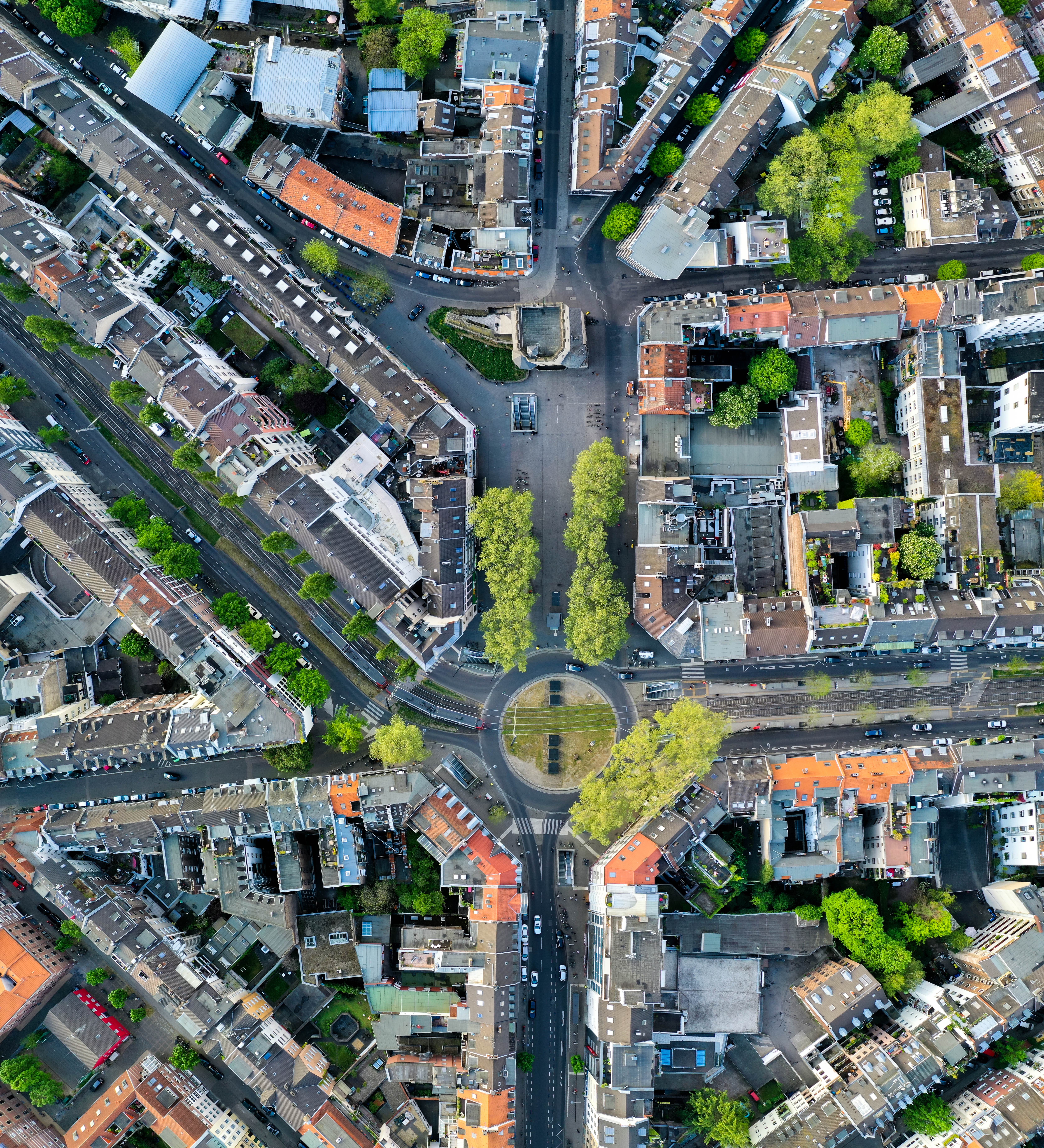 Der Chlodwigplatz gehört zu den sechs Plätzen an den Kölner Ringen. Die Severinstraße endet hier von Norden mit der Severinstorburg. Das Foto ist Nord-Süd ausgerichtet und besteht aus 8 orthogonalen Einzelaufnahmen, aufgenommen aus einer Höhe von etwa 150 Metern an einem Sonntag. Wegen der Corona-Pandemie ist der Platz schwach besetzt, der Verkehr sehr gering. Der Kreisverkehr bedient in Ost und West die Ringe, nach Süden geht davon die Bonner Straße ab. Genehmigungen für diesen Drohnenflug kamen von der Stadt Köln, der Bezirksregierung Düsseldorf und der Deutschen Flugsicherung.